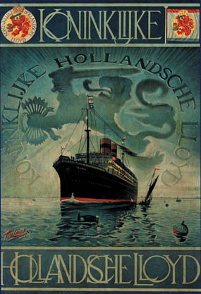 Tiete van der Laars, Koninklijke Hollandsche Lloyd, circa 1913